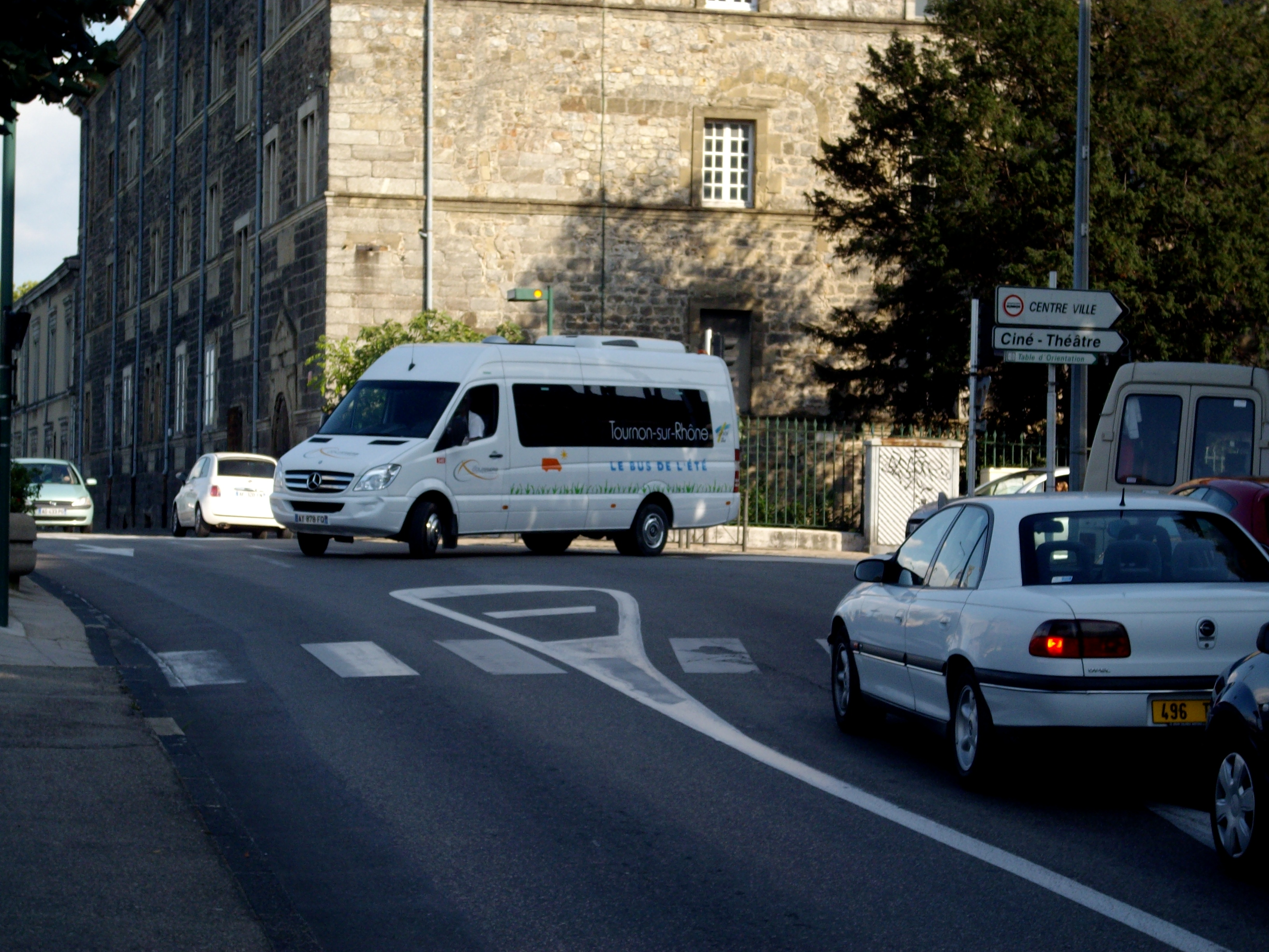 bus de l'été de tournon sur rhone devant la paserlle